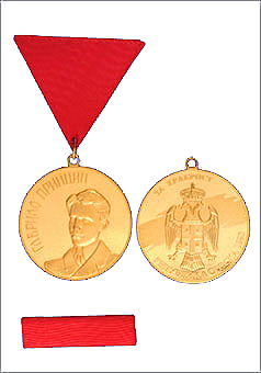 Srpski (latinica): Medalja za hrabrost zlatna